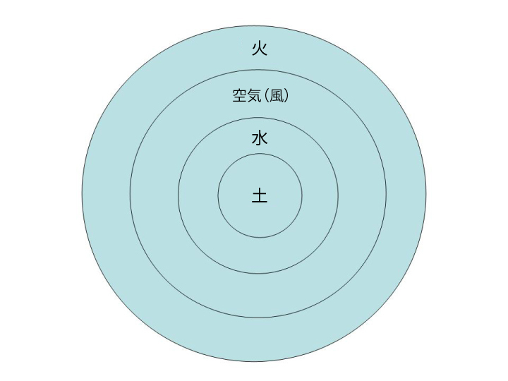 Eléments_Zones1.jpgを翻訳. オリジナルはen:User:Toxicotravailがアップロード.